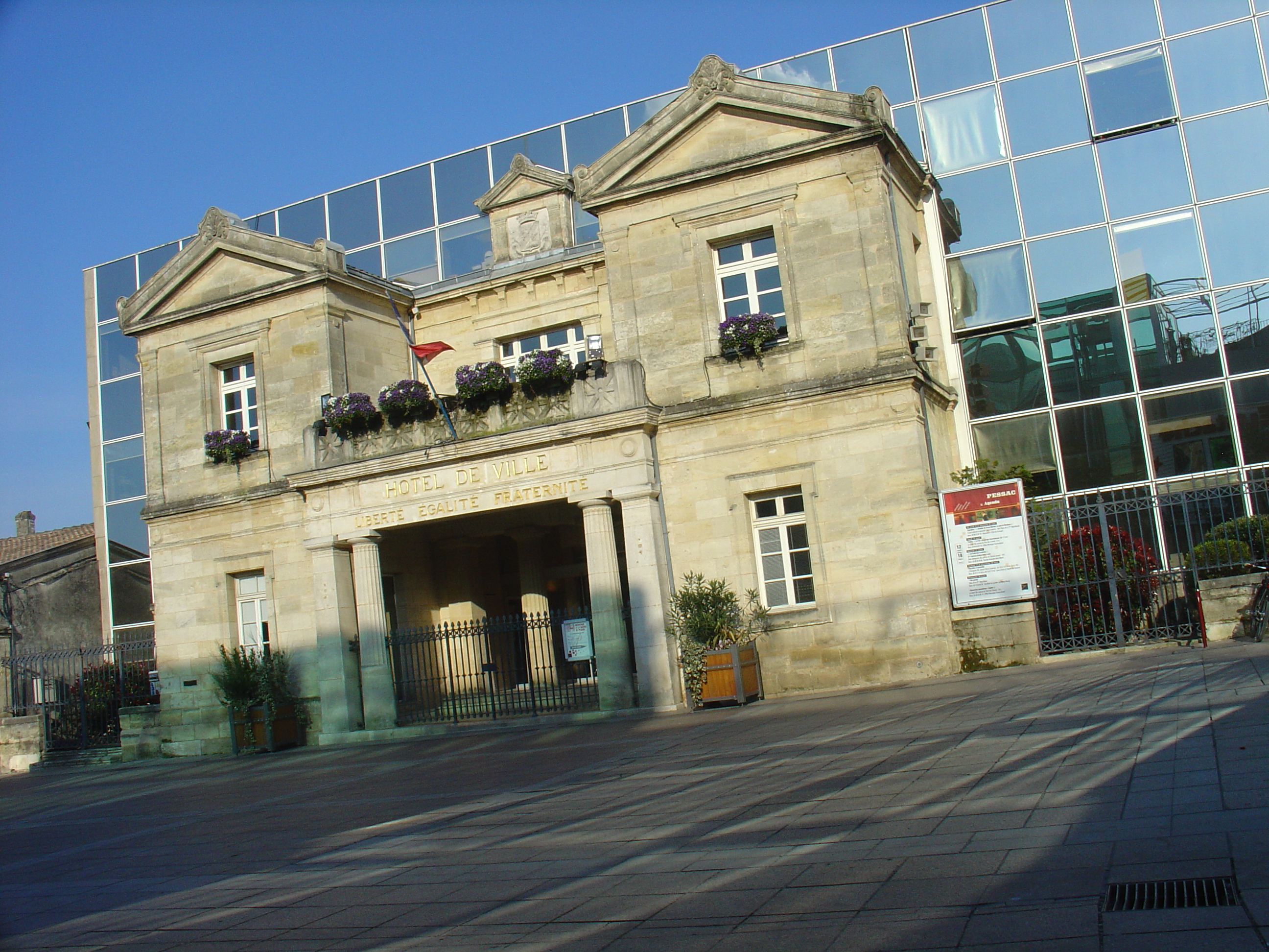 Photo de la mairie de Pessac en mars 2007 prise par Carmen Buze